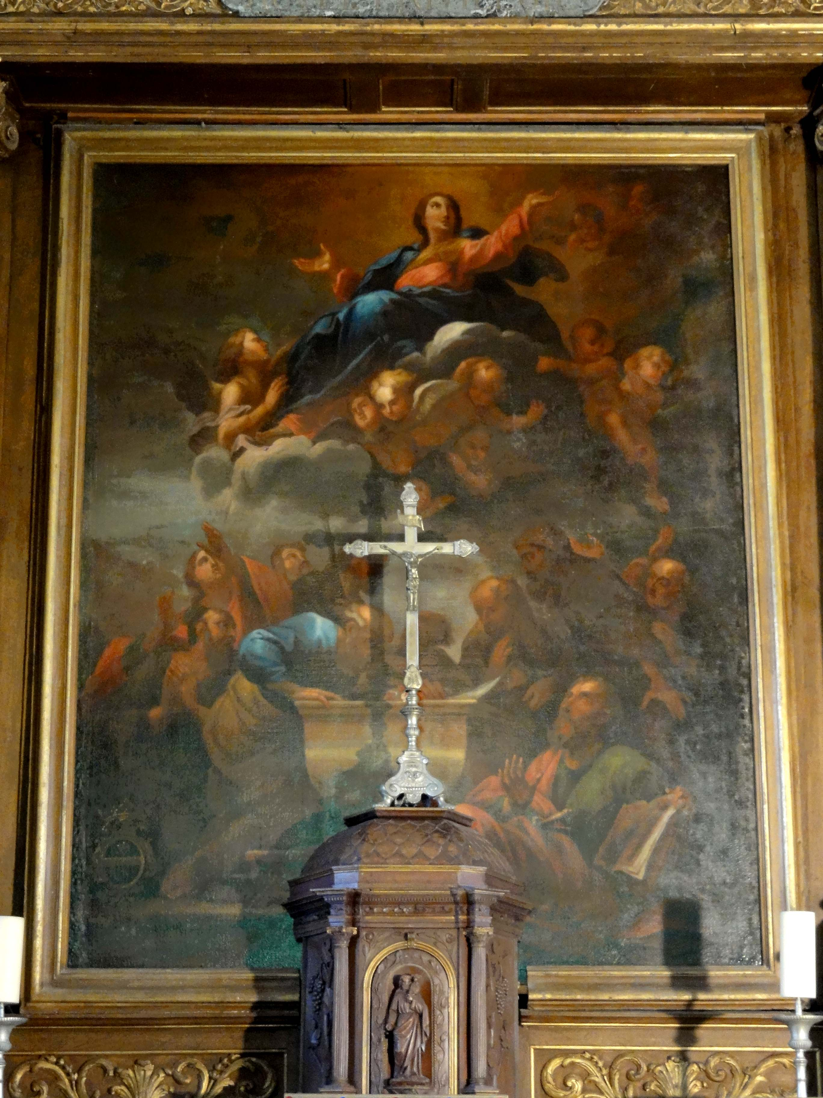 Voir titre.